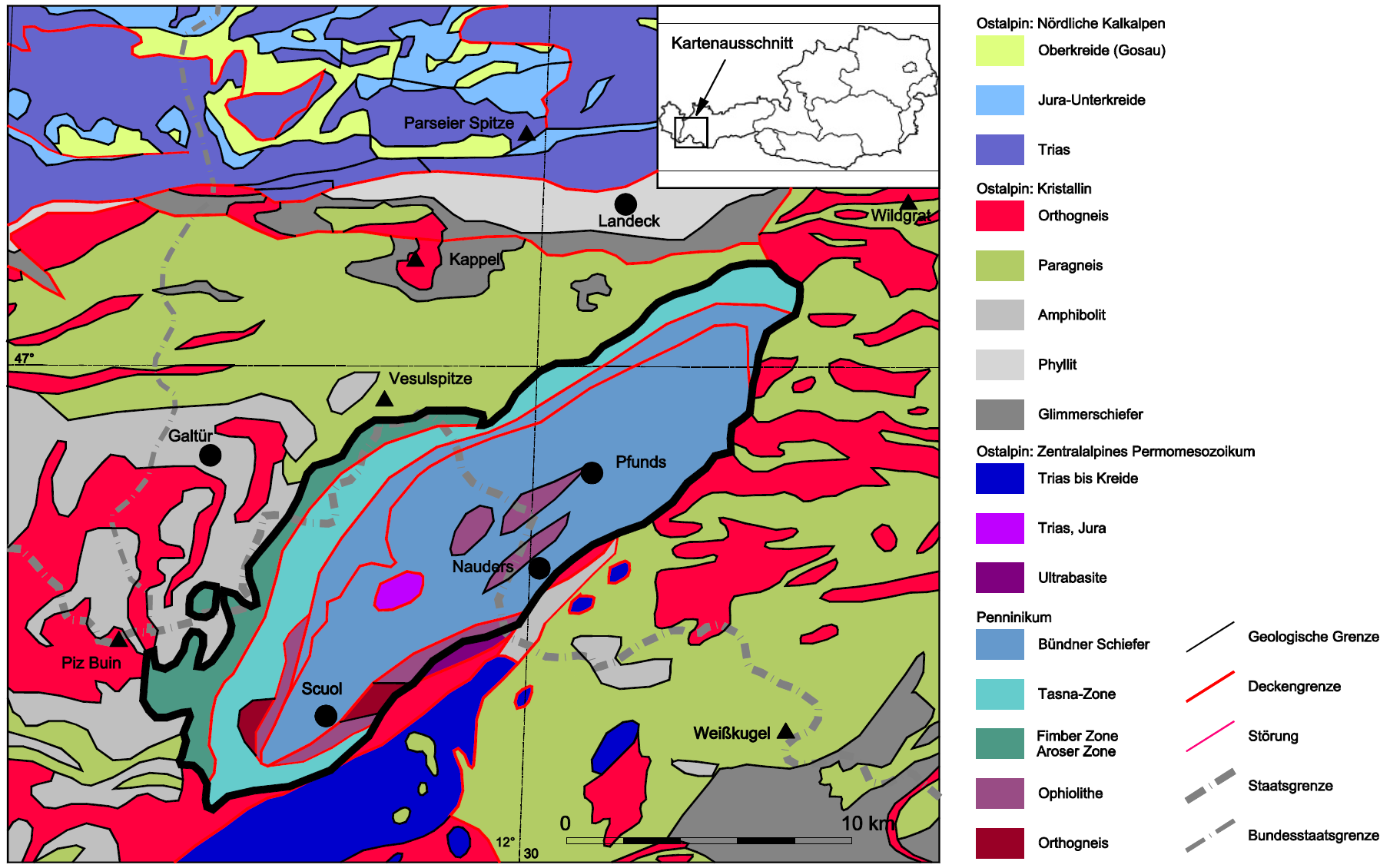 Geologische Karte des Engadiner Fensters